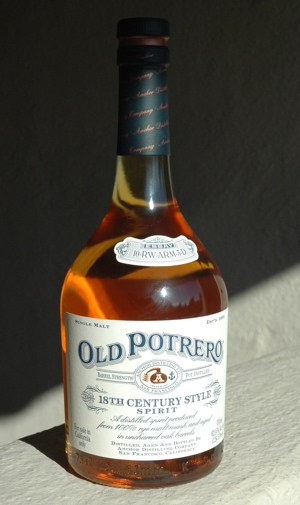 Une bouteille du whiskey de seigle Old Potrero, distillé par Anchor Brewing Company à San Francisco depuis 1993, ici dans sa version non diluée 18th Century Style. Photo : Arnaud H. Licence Creative Commons.